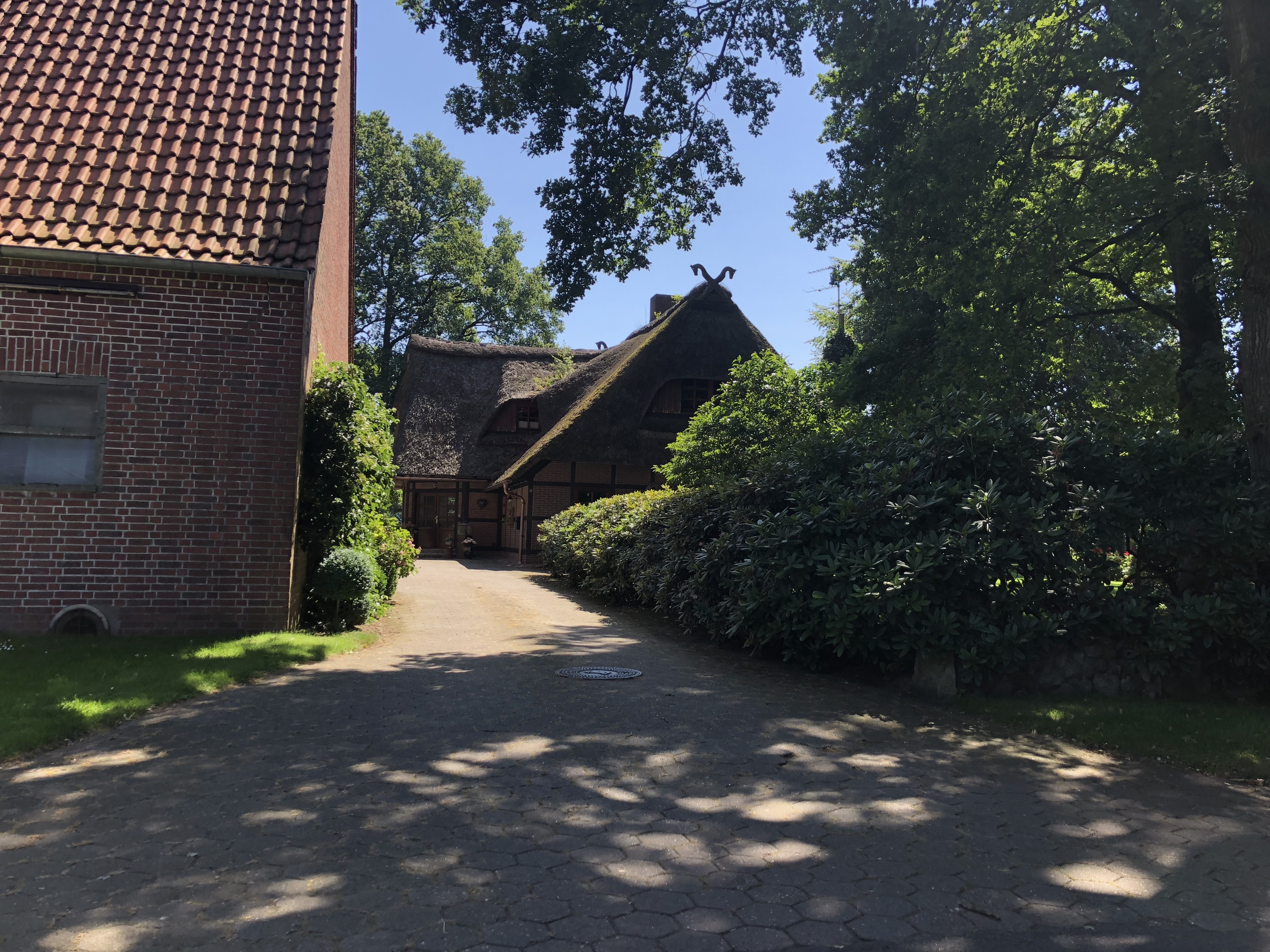 Buurnhuus in Kommerbusch